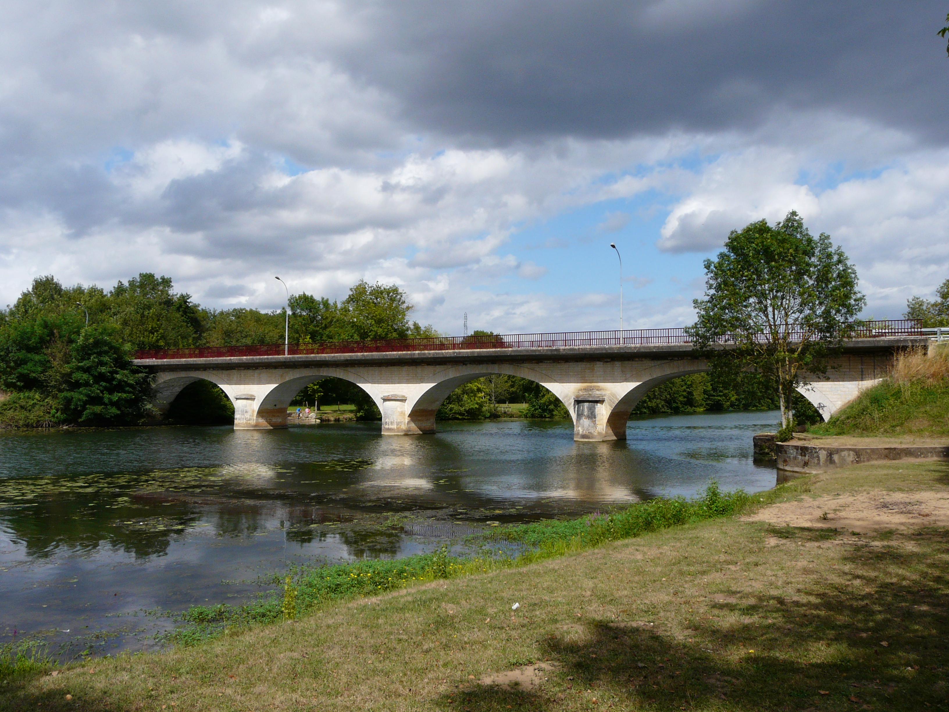 Le pont de Saint-Léon-sur-l'Isle vu depuis l'aval, Dordogne, France.